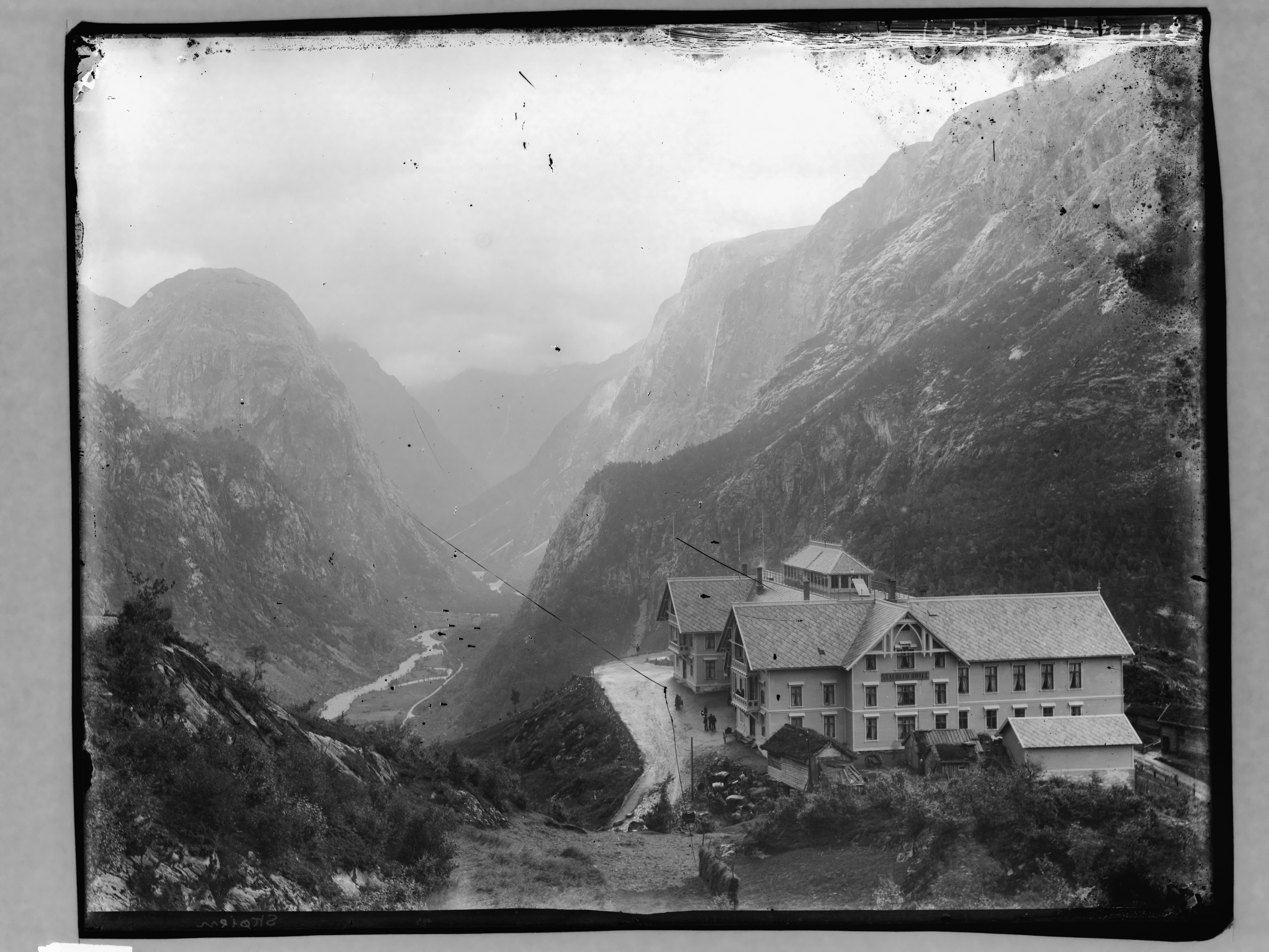 Påskrift negativ: 281 Stalheim Hotel Skøien [Riksantikvaren] Påskrift konvolutt: B-281 Vossestrand Hotel Stalheim II [Riksantikvaren] Sted: Nærøydalen,Stalheim Kommune: Voss Fylke: Hordaland Tagger: landskap fjell dalføre utsikt fasade hotell Stalheim hotel